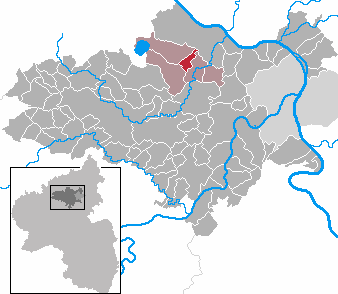 Kretz in Rhineland-Palatinate - district Mayen-Koblenz